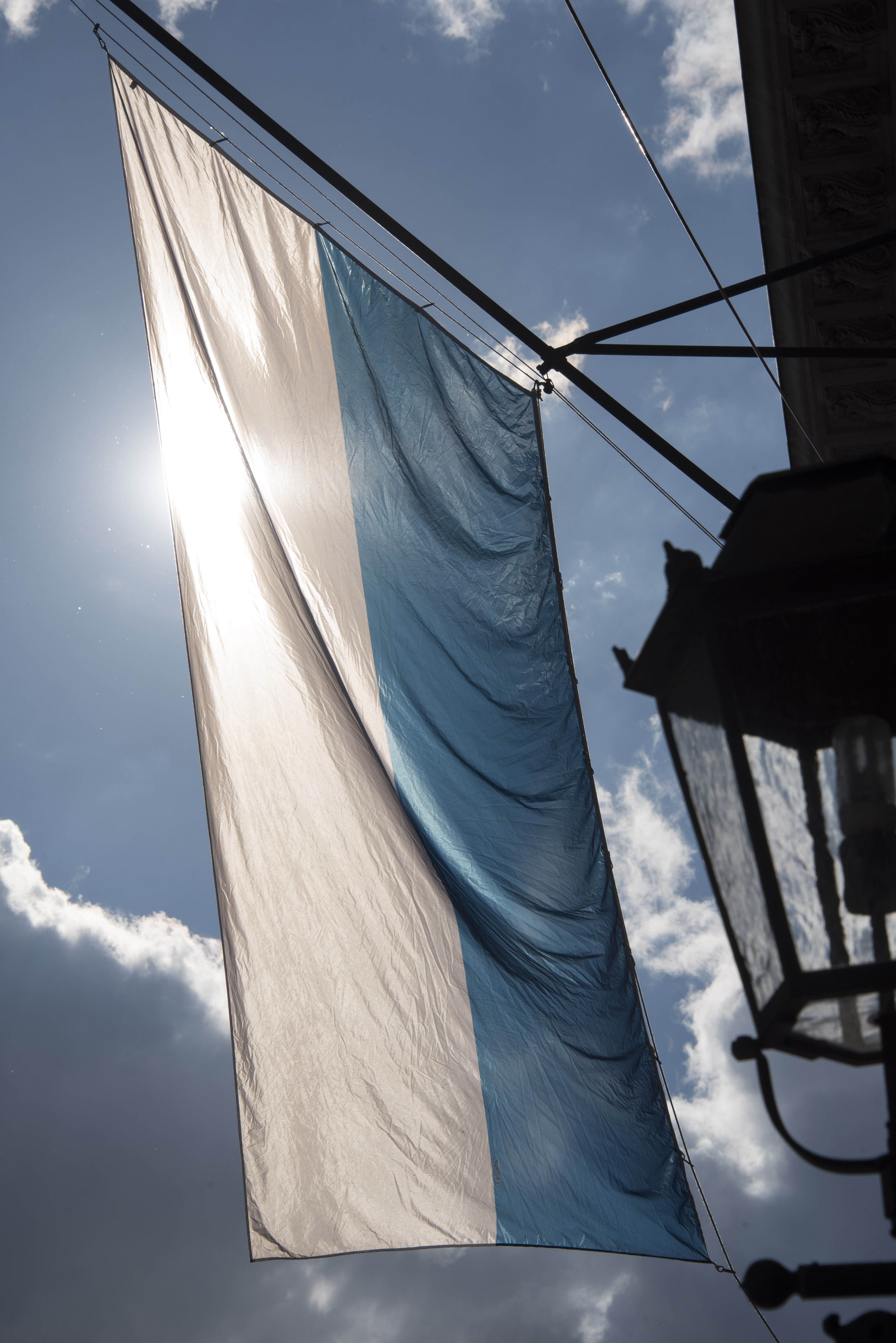 Bavarian Flag